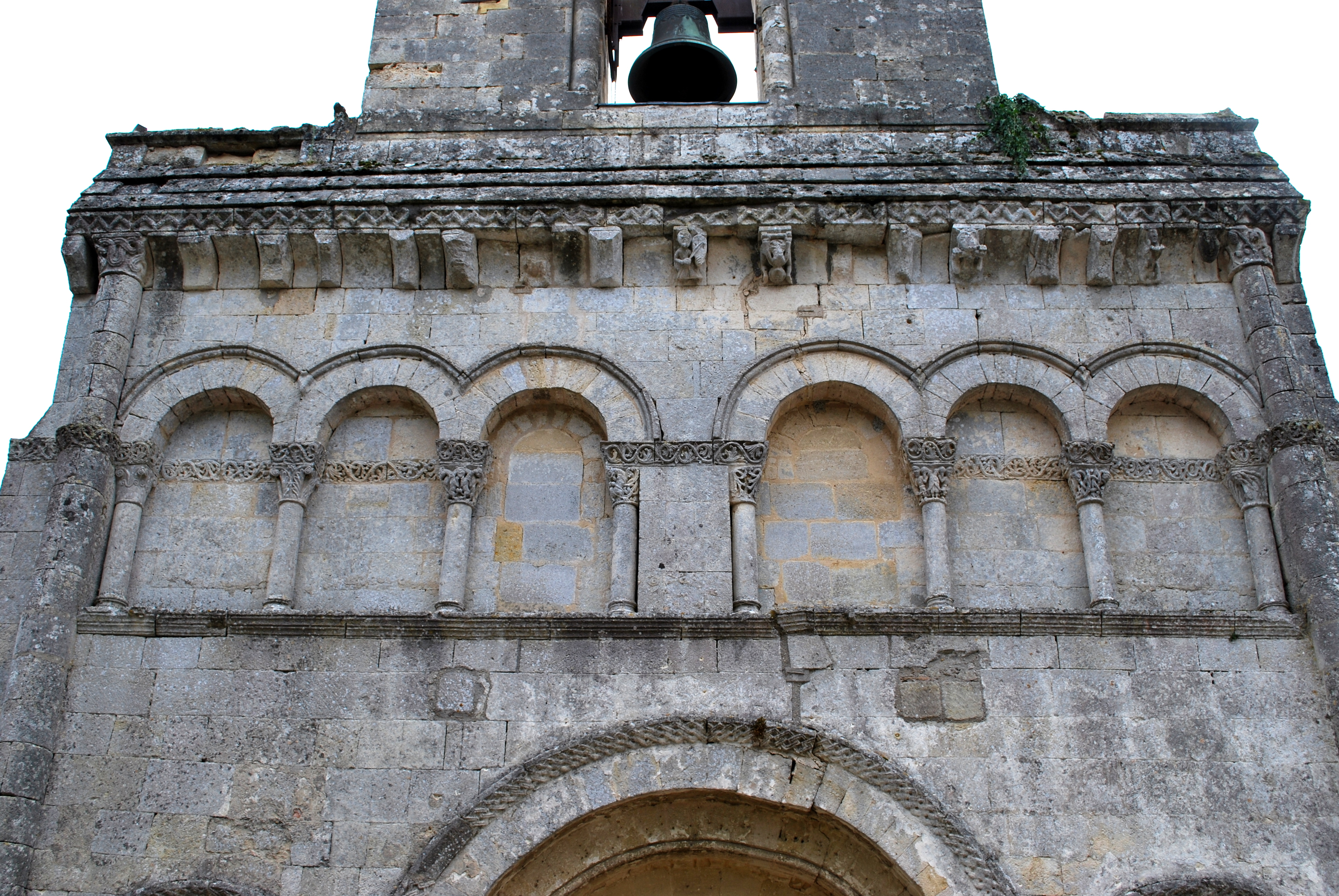 Tauriac (Gironde)